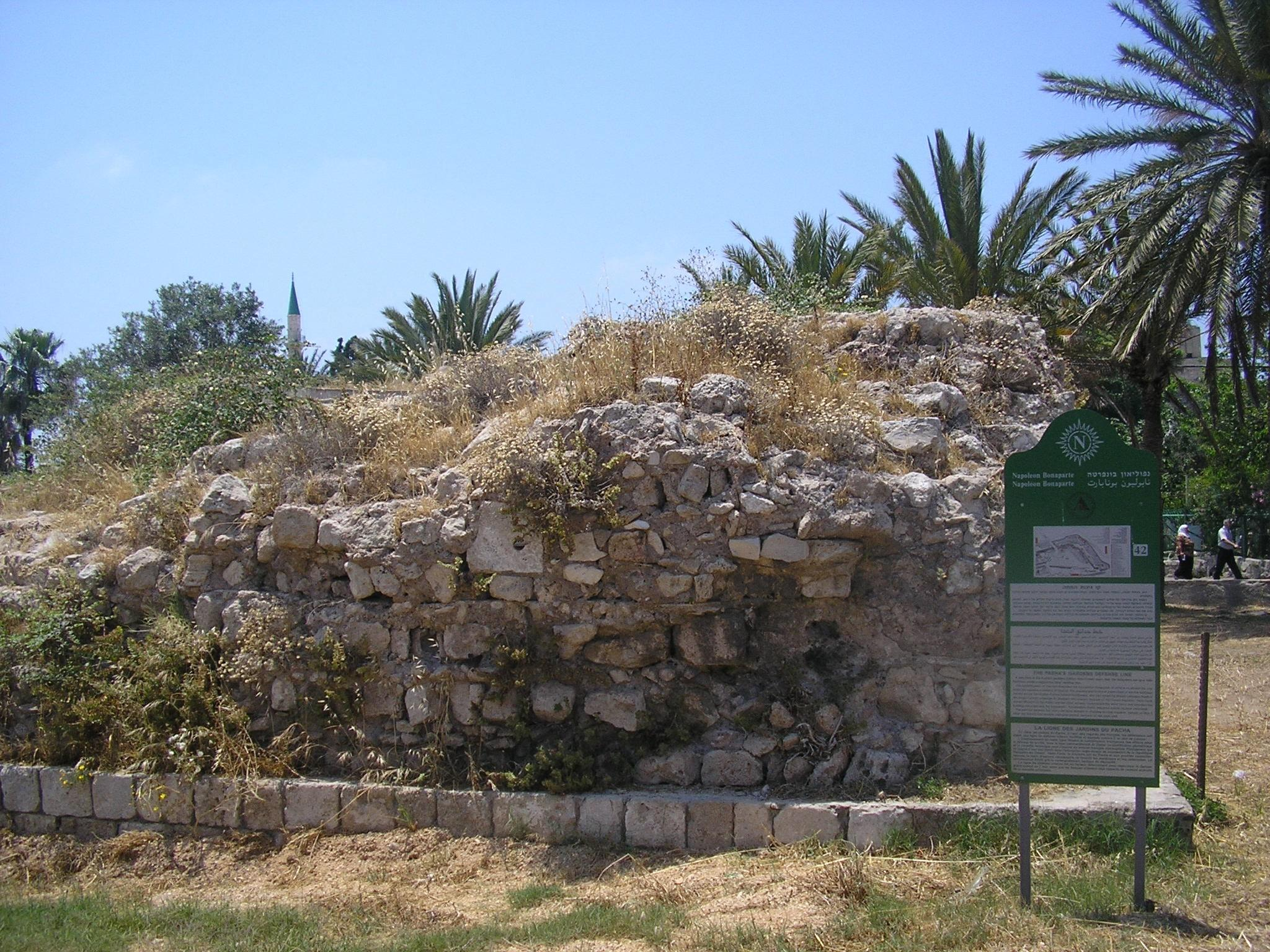 The remains of the internal fortification line erected by Farkhi and De-Phelipoux within the walls of Acre, during Napoleons siege, May, 1799. Today in Acre (Akko, Israel). קטע מקו הביצורים הפנימי שנבנה על ידי דה פליפו ופרחי בתוך העיר עכו במהלך המצור על ידי נפוליון במאי 1799, כיום בעכו, ישראל